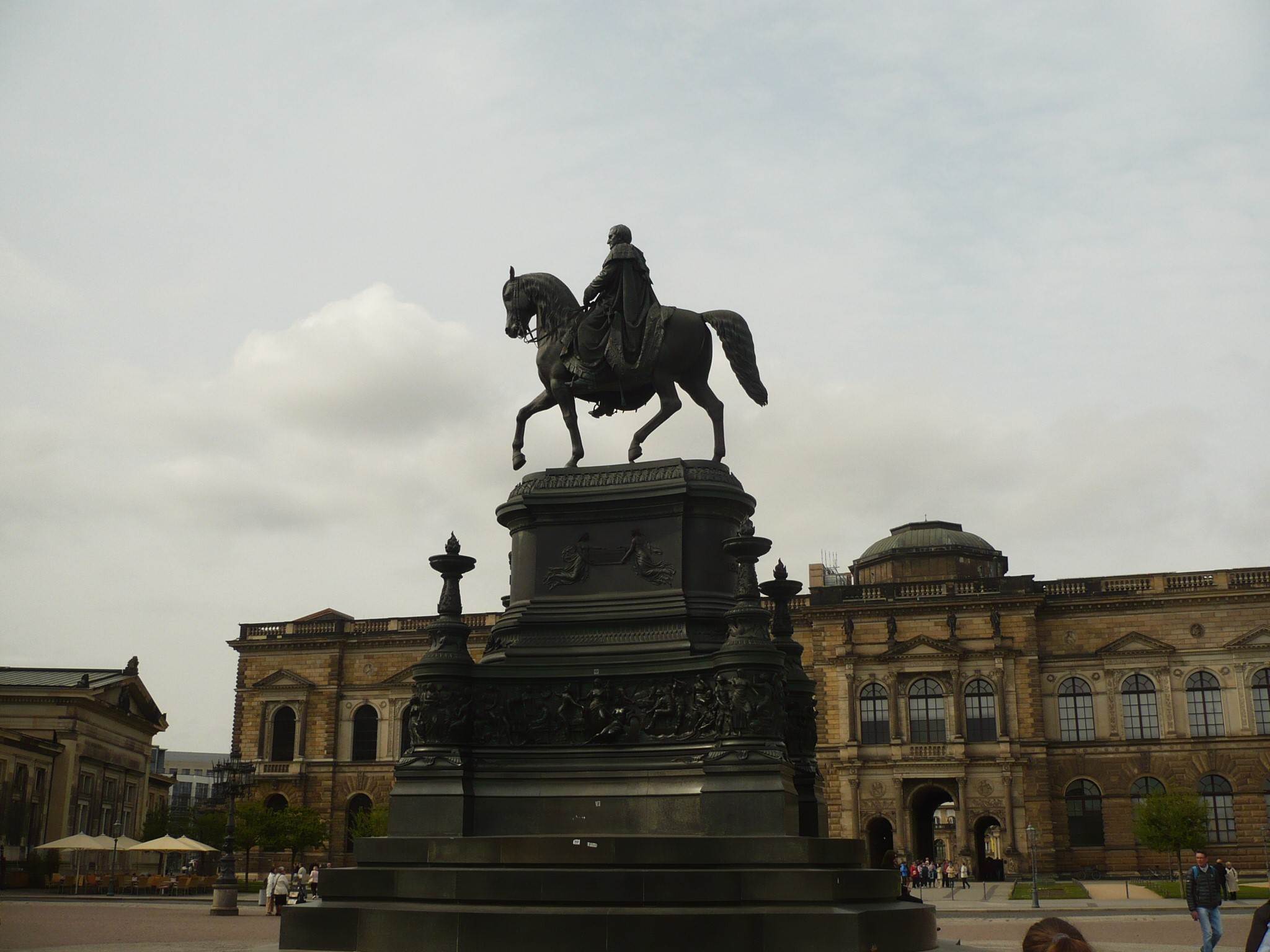 Drezno. Pomnik przed Operą